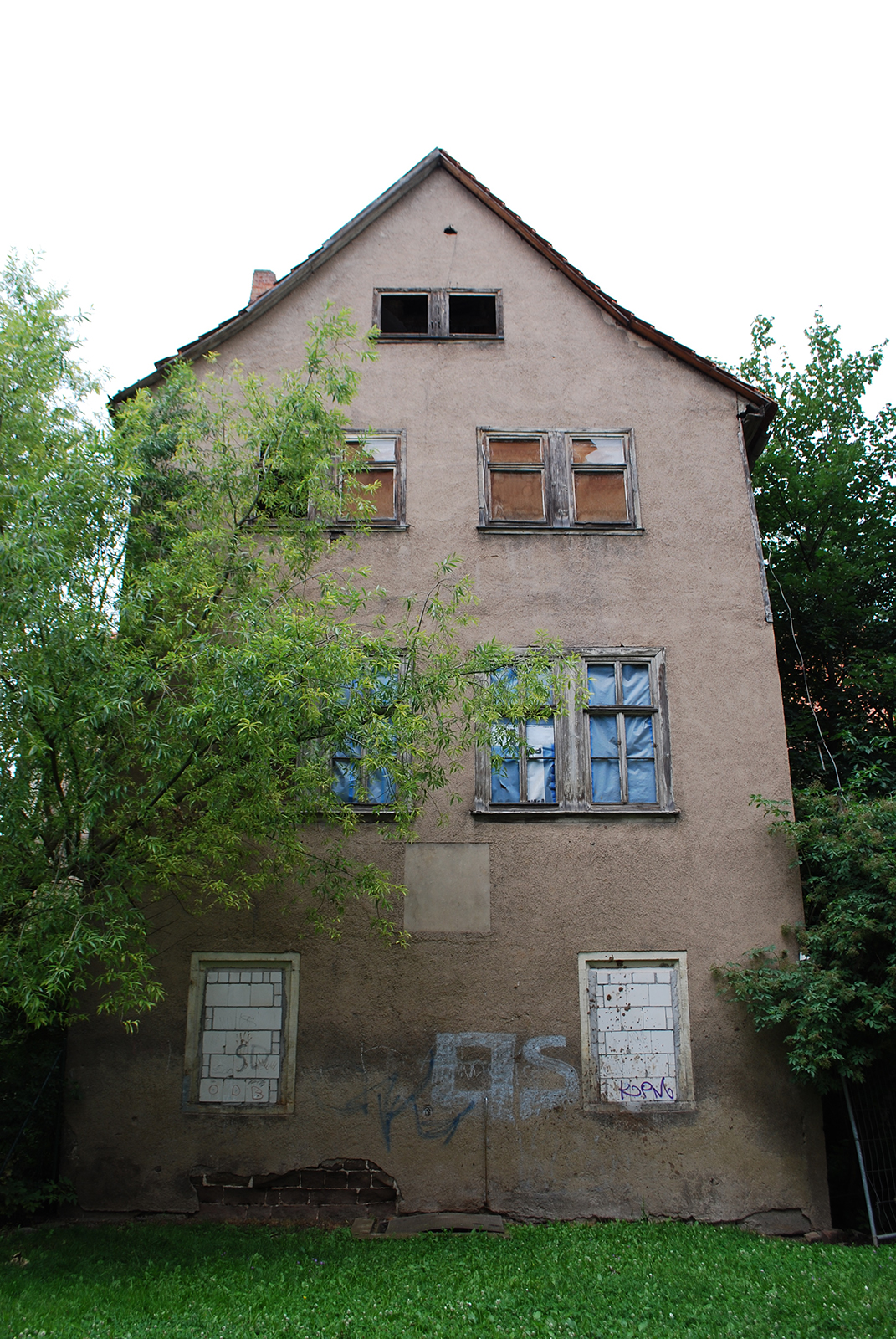 Gotha, Augustinerstraße 15, Amtshaus, mittelalterlicher Gebäudeteil im Hof (2012 abgerissen)